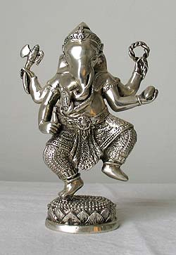 Photo perso de Ganesh Source : Shakti Statut : GFDL dans ce format Shakti